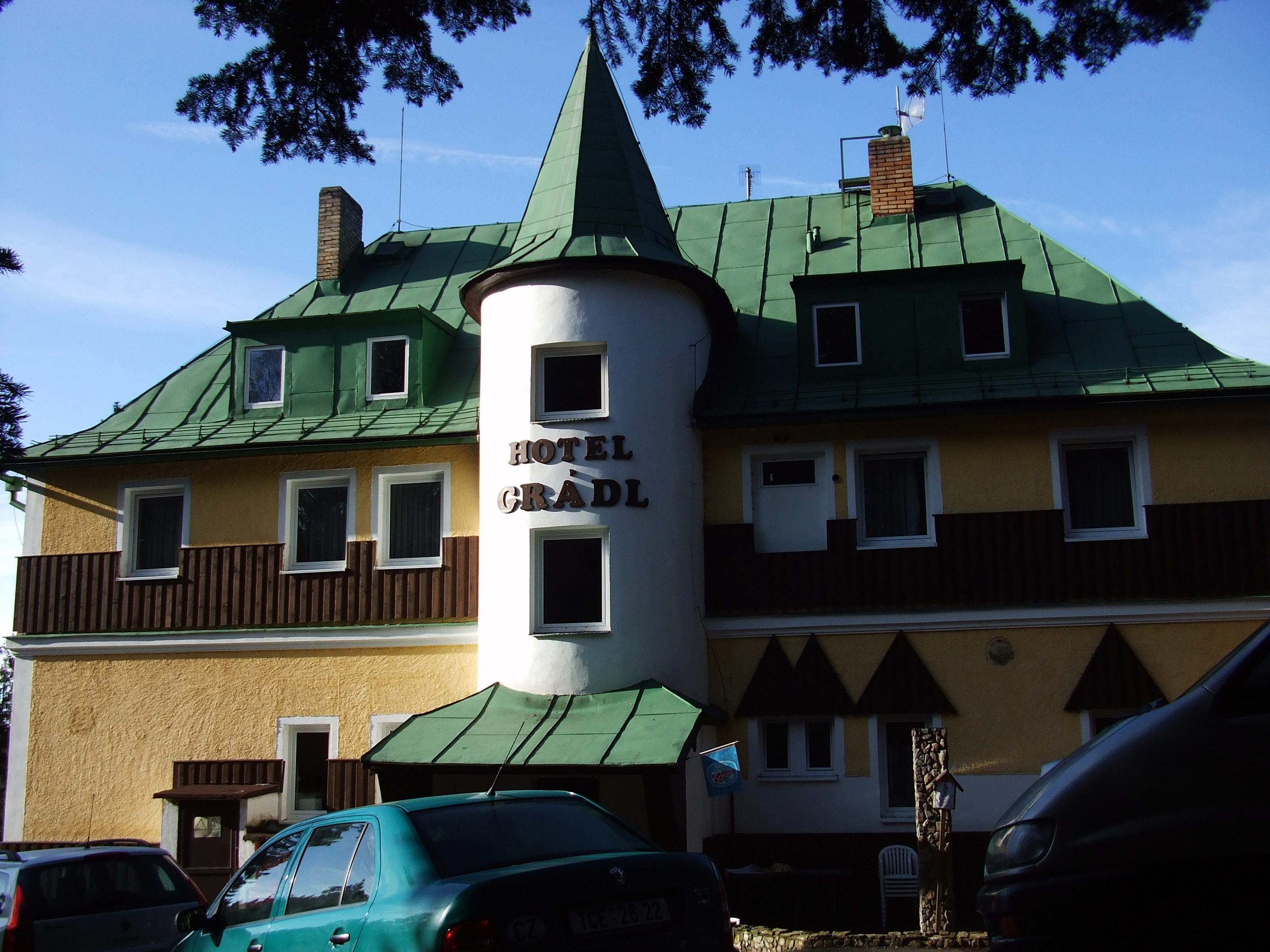 Hotel Grádl Železná Ruda